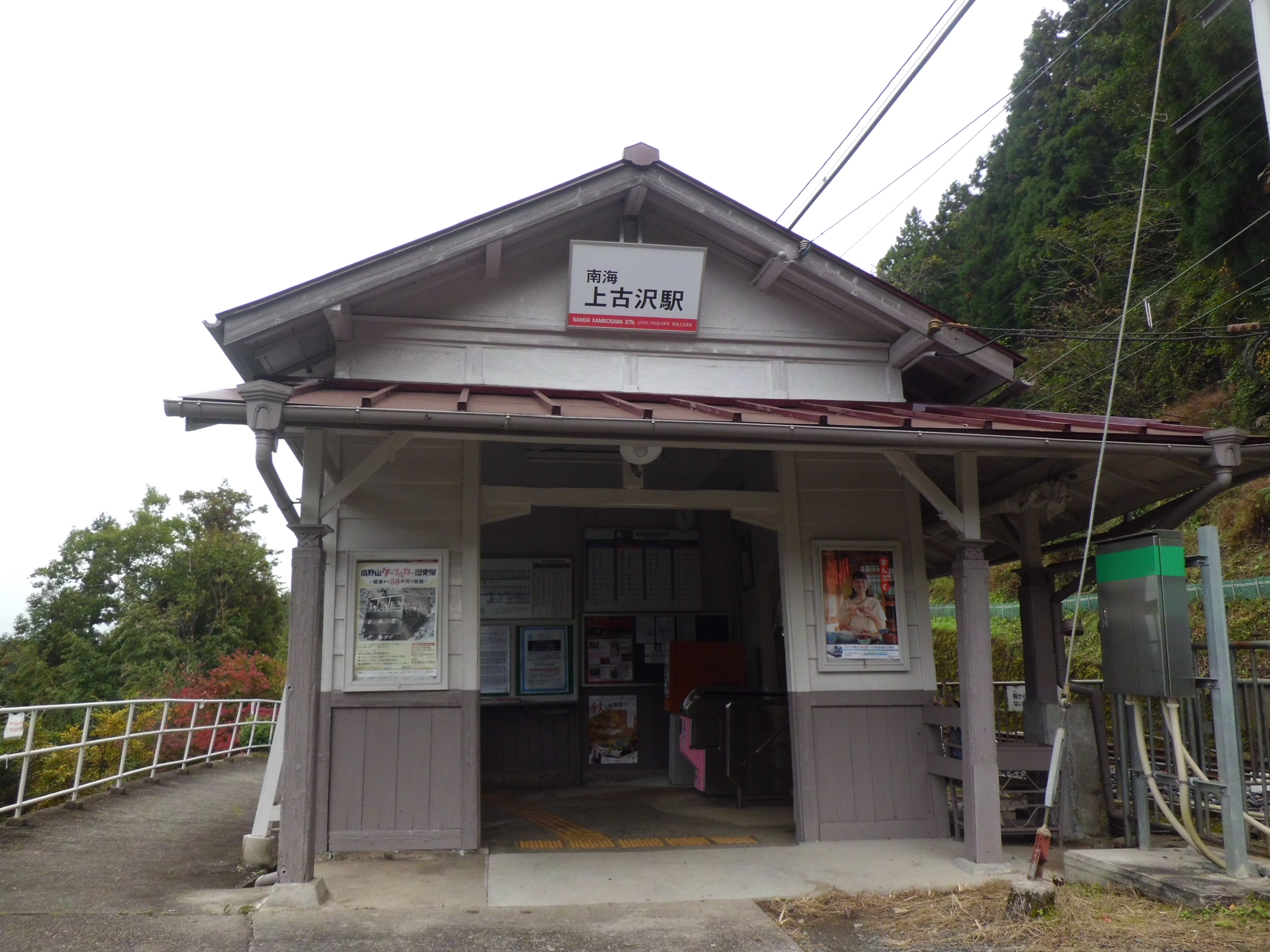 上古沢駅舎